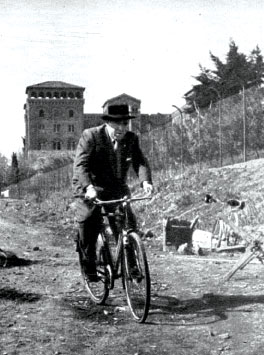 Cesare Zavattini in una foto del 1951